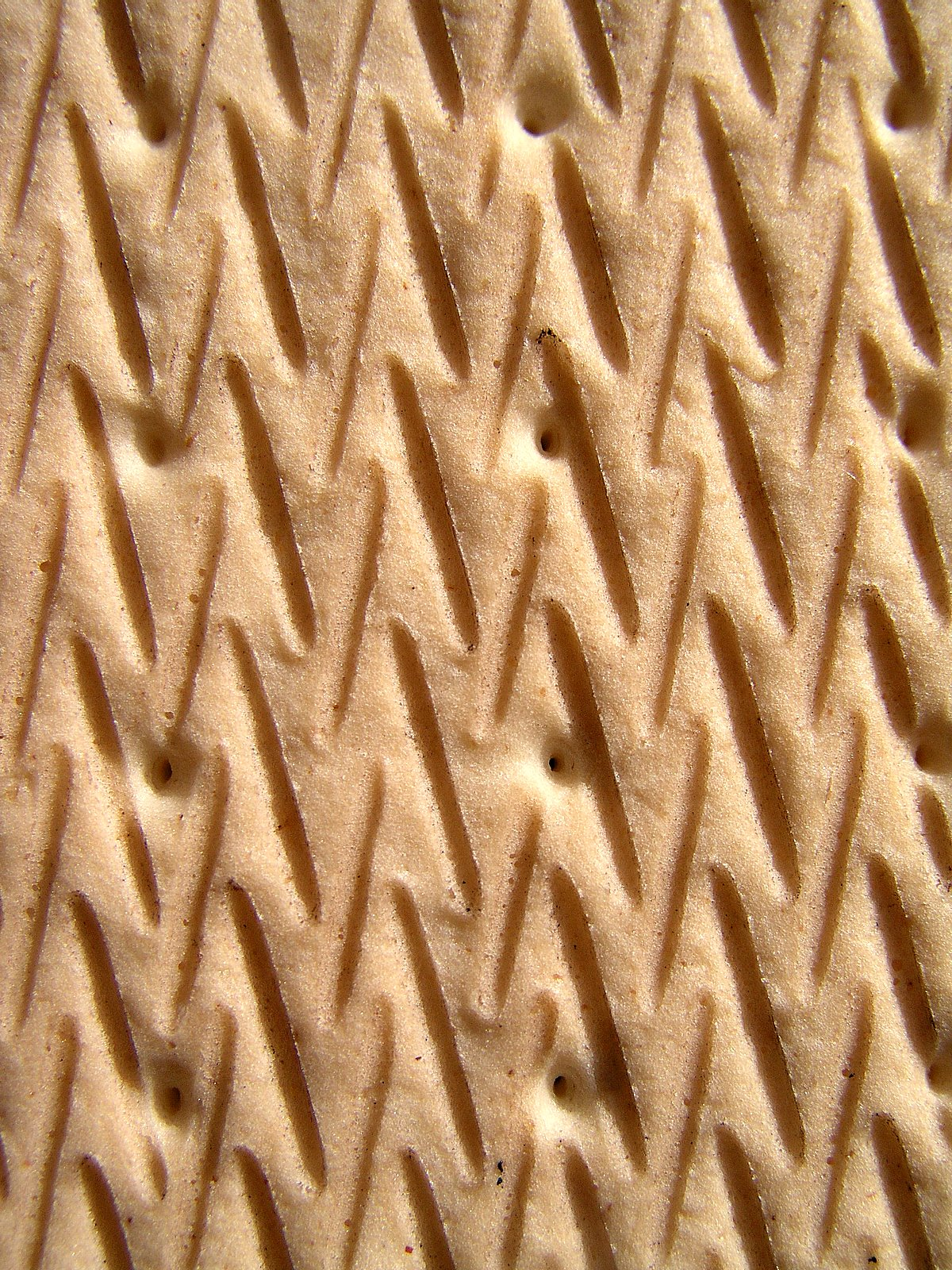 ביסקוויט- מאקרו